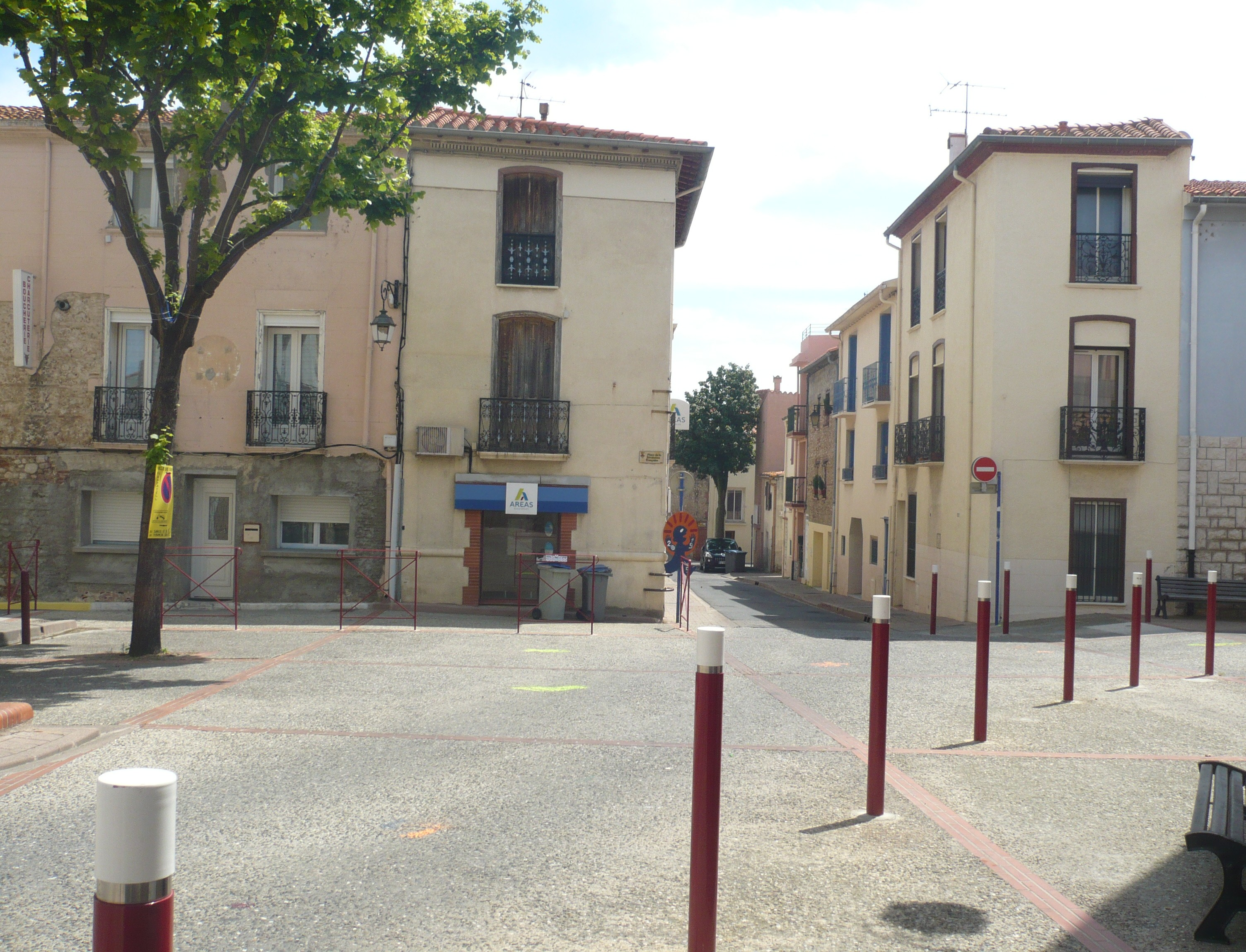 Place de la Révolution française à Cabestany